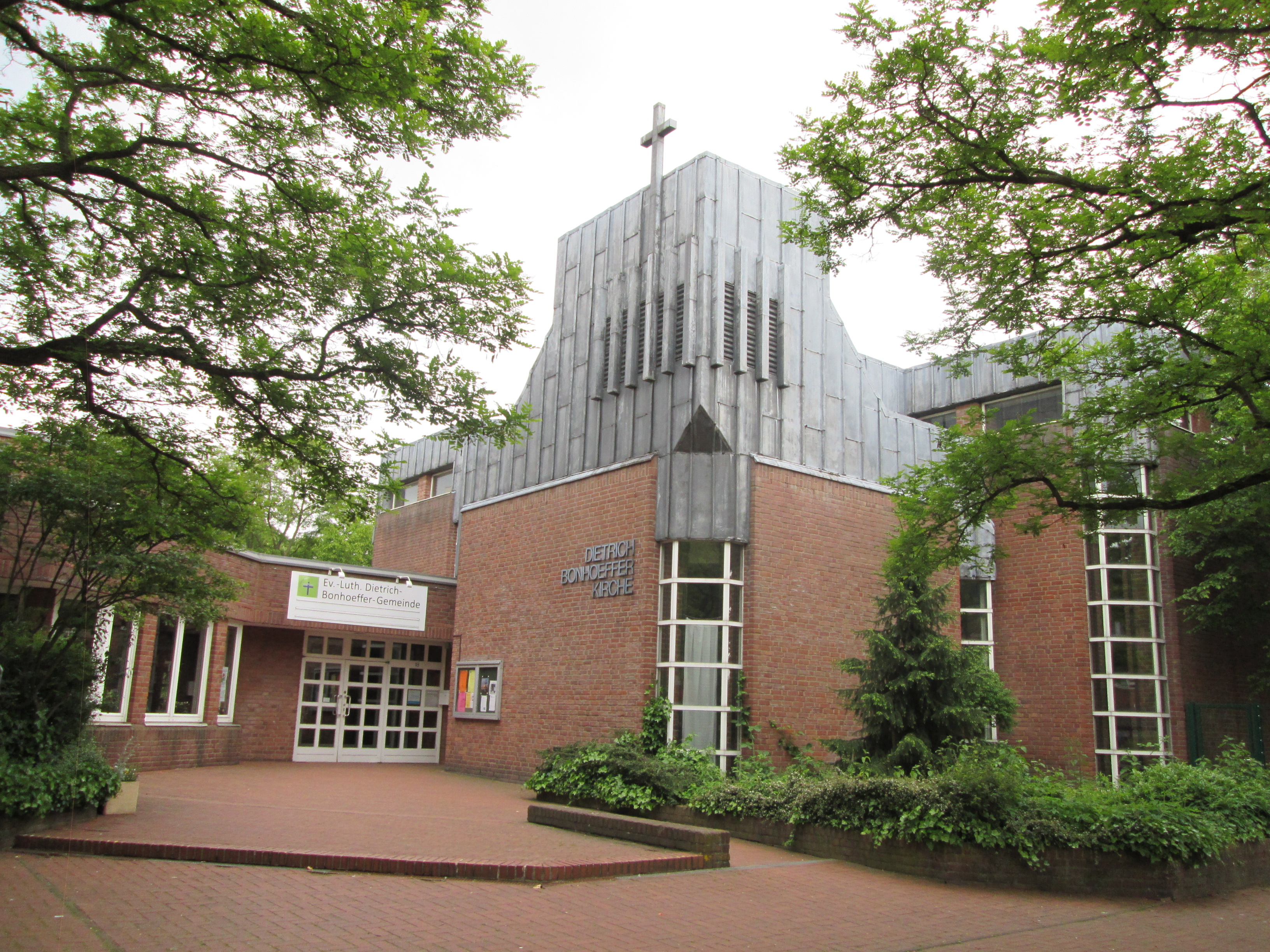 Evang.-luth. Dietrich-Bonhoeffer-Kirche - Hannover-Roderbruch Roderbruchmarkt